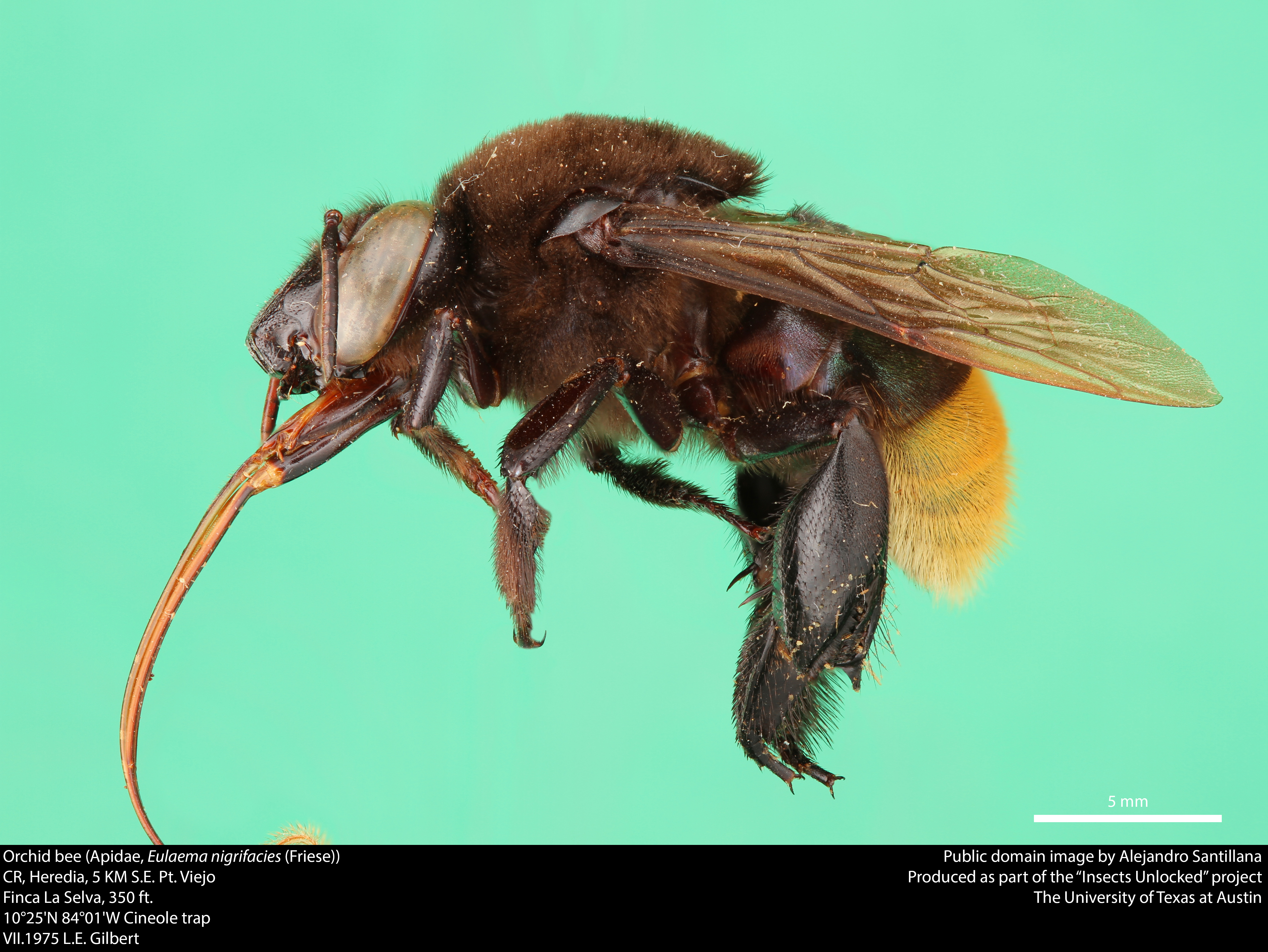 Orchid bee (Apidae, Eulaema nigrifacies (Friese)) CR, Heredia, 5 KM S.E. Pt. Viejo Finca La Selva, 350 ft. 10°25'N 84°01'W Cineole trap VII.1975 L.E. Gilbert